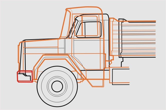 Кабина Магируса. Модель 1971 года в сравнении с моделью 1953 года